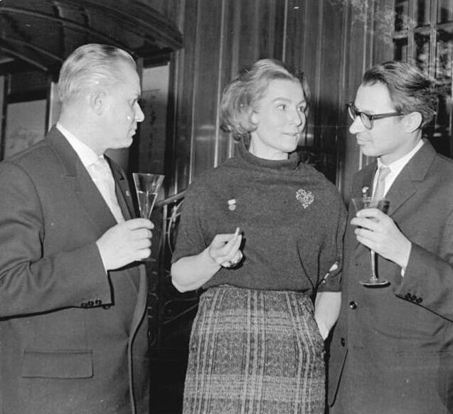 Zentralbild/Brüggmann 30.3.1960 Verleihung des Kunstpreises der DDR. Der Kunstpreis der DDR wurde am 30.3.1960 im Apollosaal der Deutschen Staatsoper Unter den Linden an hervorragende Künstler der Deutschen Demokratischen Republik verliehen. (Näheres siehe ADN-Meldung 712 vom 30.3.60). UBz. Nach der Auszeichnung unterhalten sich v.l.n.r. : Kollege Vogt, Vertreter der Gewerkschaft Kunst, die Schauspielerin Inge Keller und der Maler Wolfgang Frankenstein.